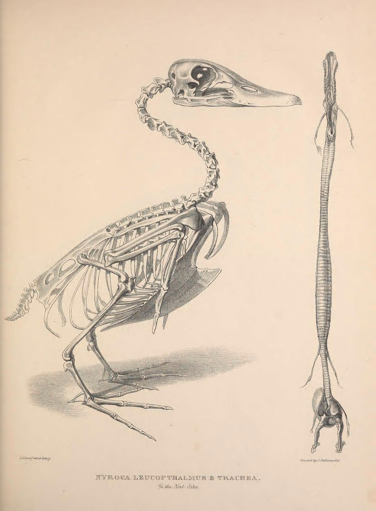 &£pfa#fdtf,t& tibkoj. 'nvt-vUd-- in/ C 6«&\n..tnJ.X WYFLOVJL iLECTCOPTHAJLMILrS .& TRACHEA